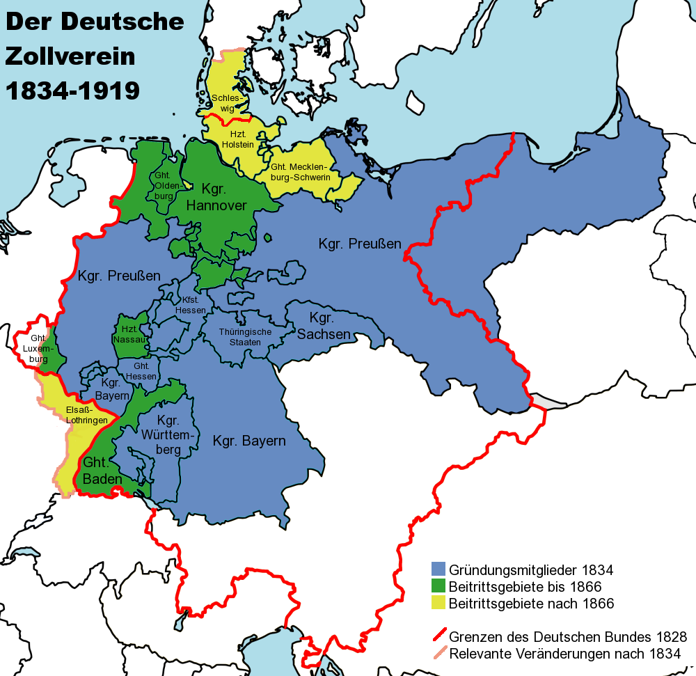 Deutscher Zollverein in den Grenzen des Deutschen Bundes 1834 (rot) mit für den Zollverein relevanten Außengrenzenänderungen (Schleswig, Luxemburg, Elsaß-Lothringen) in hellrot. In blau die Beitrittsstaaten 1834, grün weitere Beitritte bis 1866, gelb Beitritte nach 1866. Größere Staaten des Zollvereins sind beschriftet.